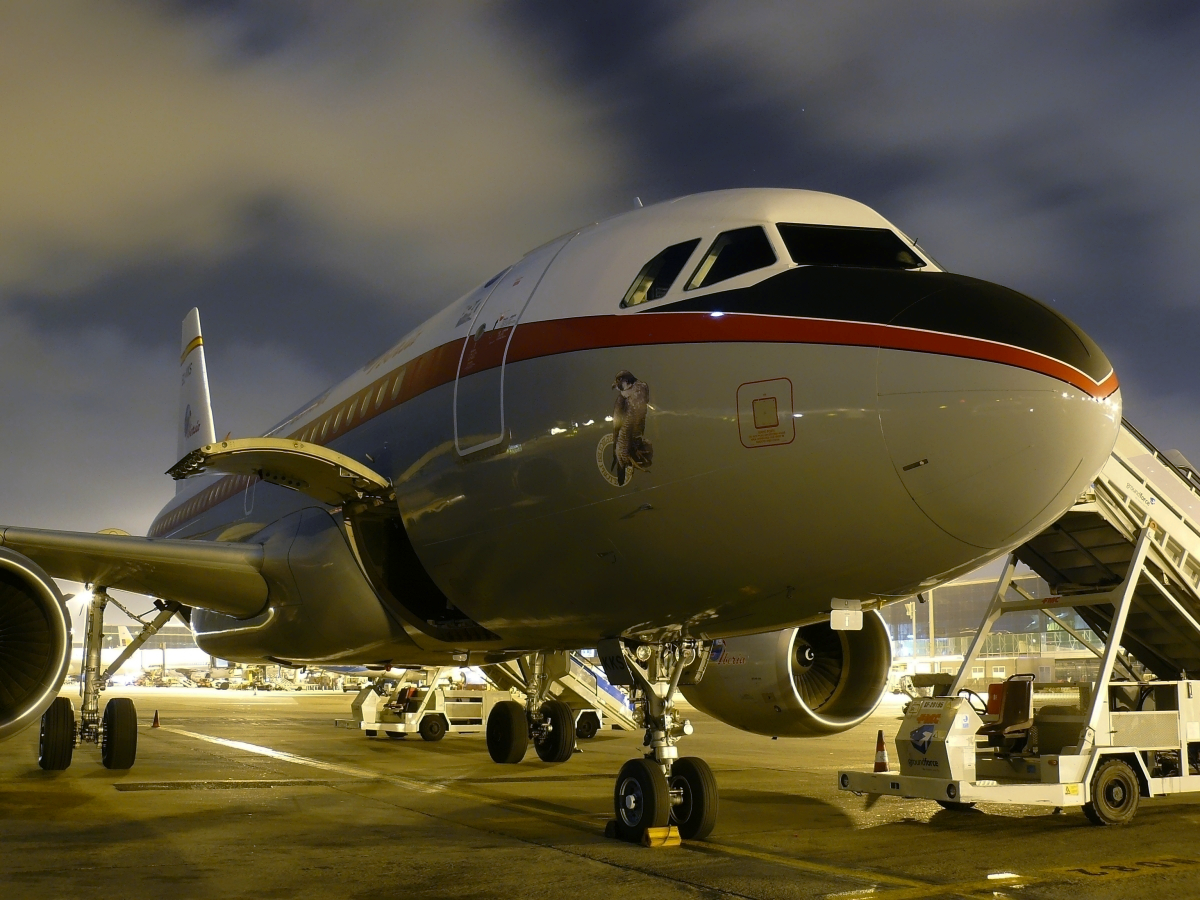 Airbus A319-111 cn 3320 Iberia EC-KKS Bautizado como "Halcón Peregrino" Entregado en Noviembre de 2007 a Iberia. Pintado con los colores retro de Iberia, en conmemoración por el 80 aniversario.